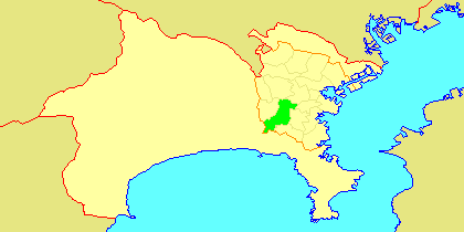 Map of Totsuka-ku, Yokohama, Kanagawa-prefecture, Japan